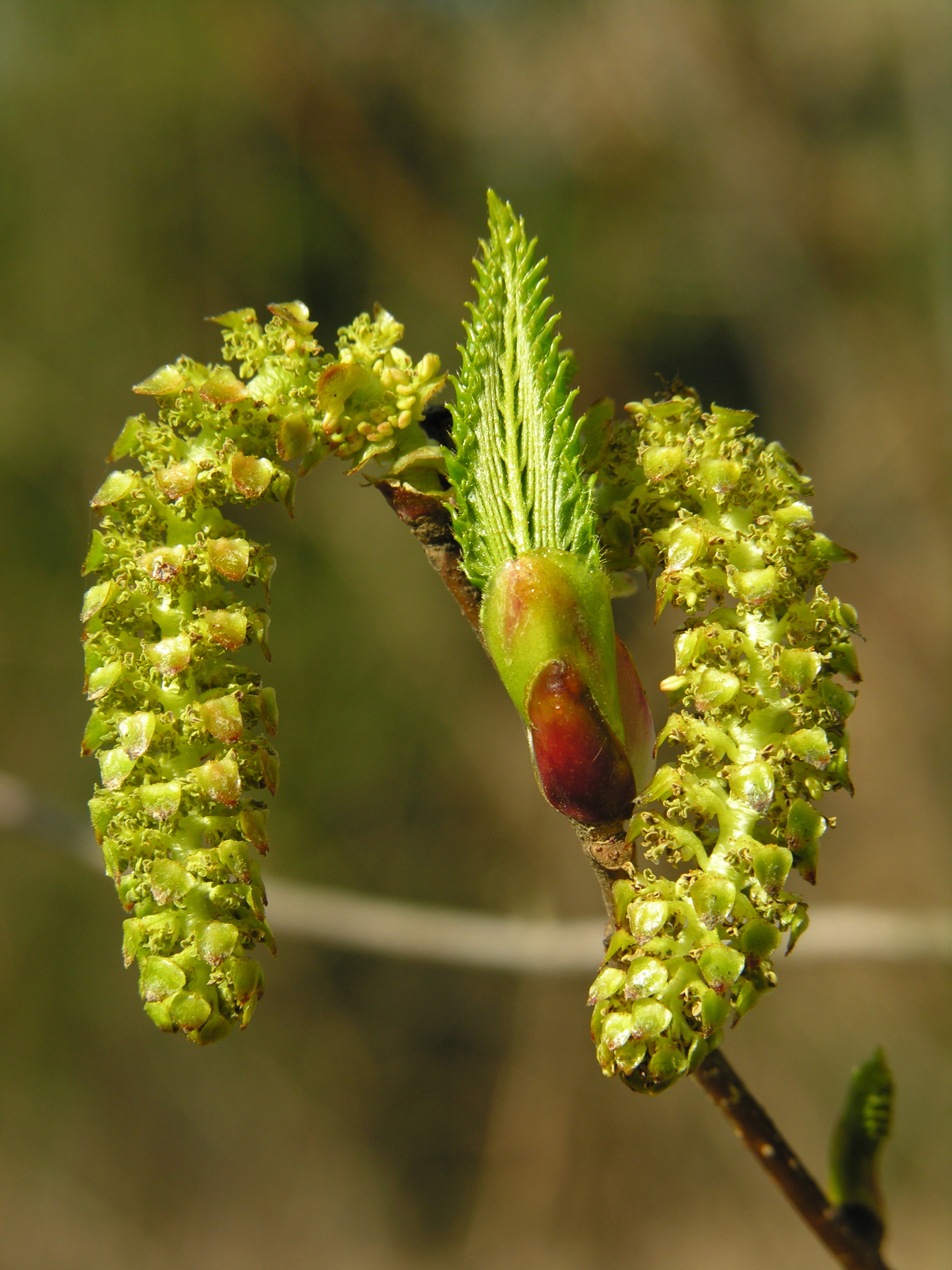 Alnus sieboldiana